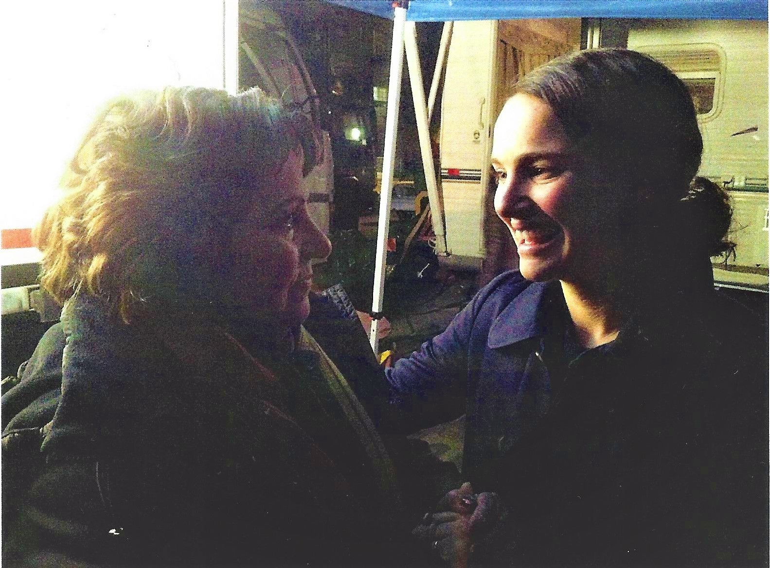 דינה דורון בחברת השחקנית נטלי פורטמן בצילומי הסרט "סיפור על אהבה וחושך"